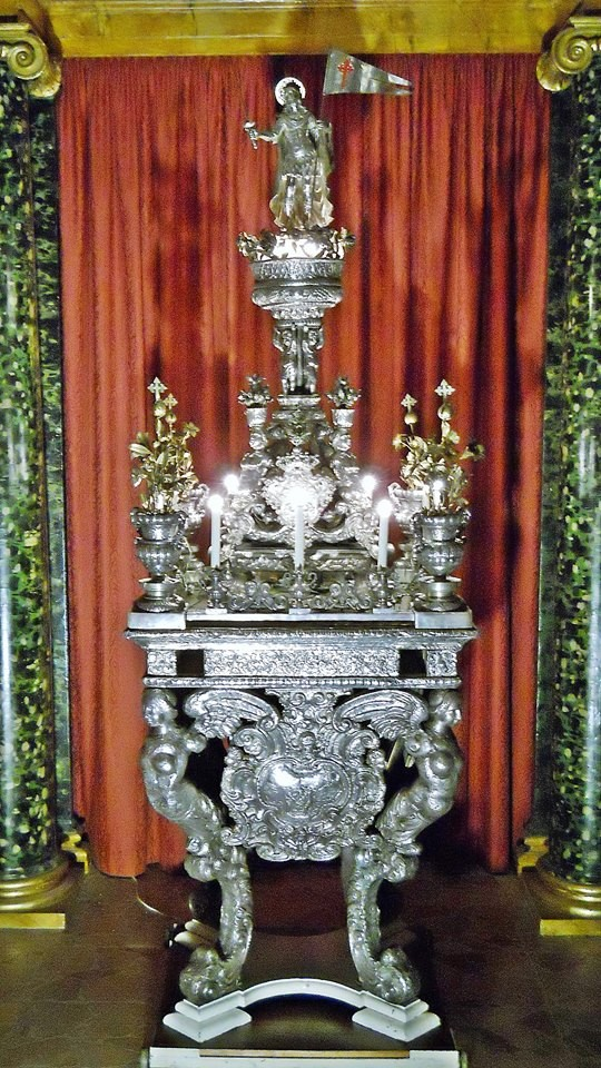 Il Fercolo di San Giacomo di Camaro